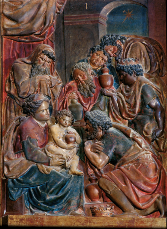 Garisoaingo elizako erretaularen xehetasuna